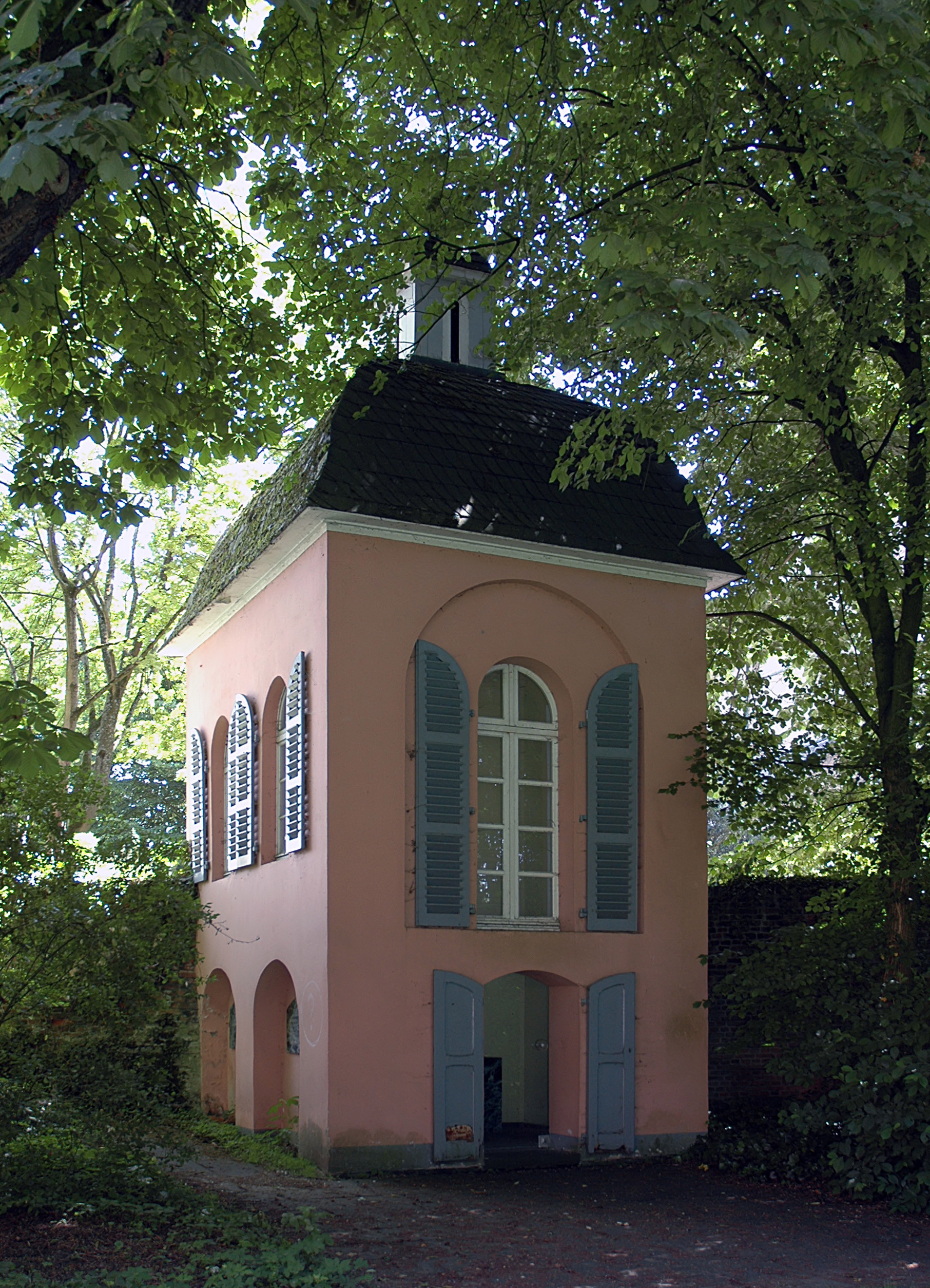 Gartenpavillon im Schlosspark Kalkum